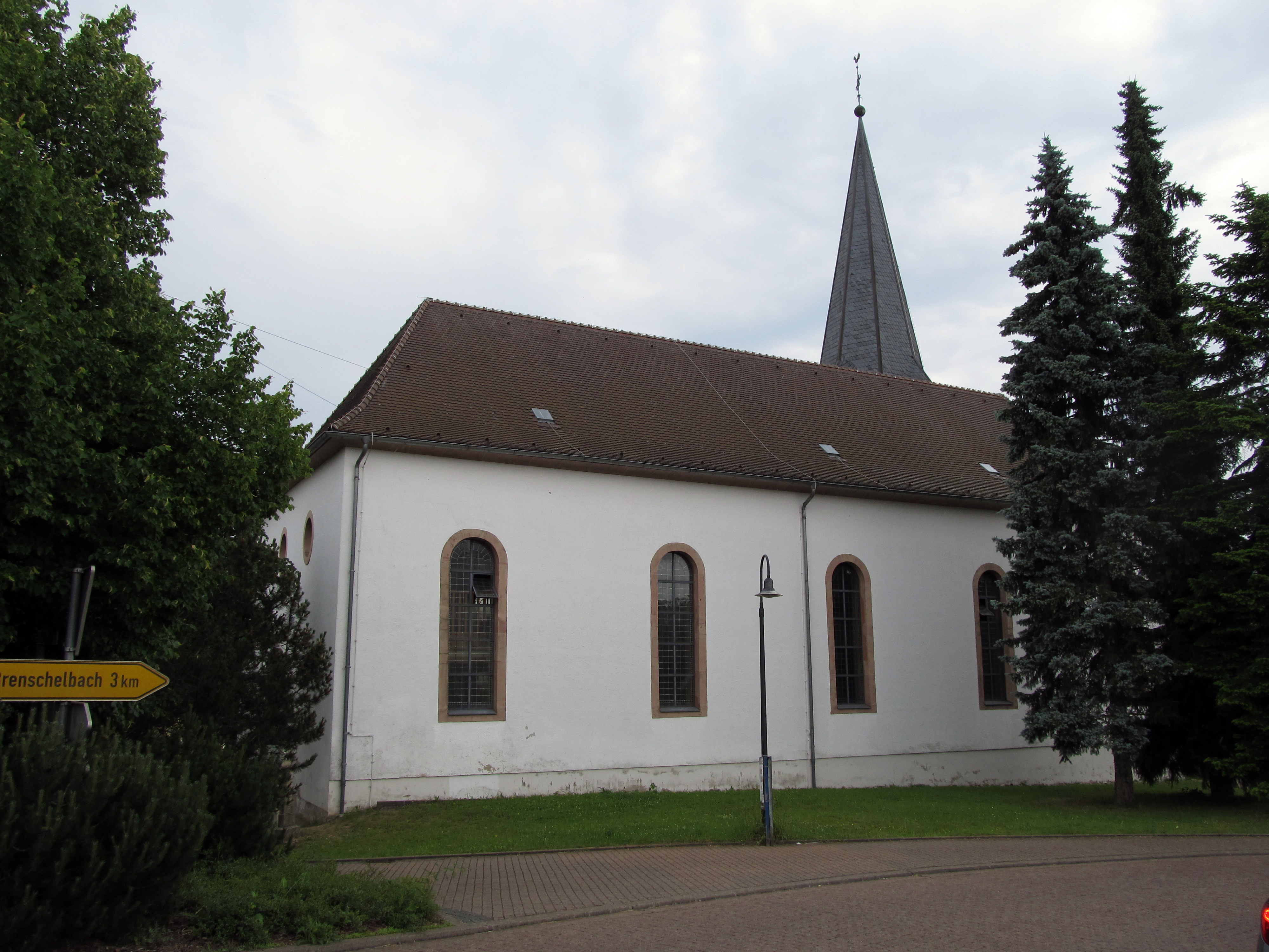 Die Pfarrkirche St. Andreas in Altheim, Saarland